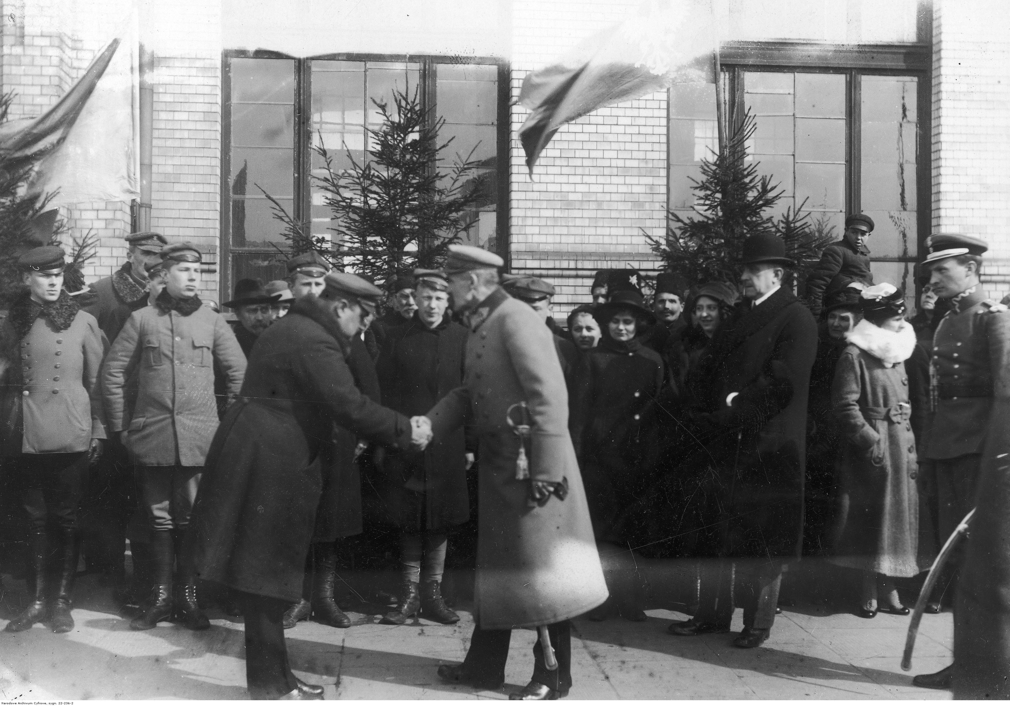 Powitania marszałka Józefa Piłsudskiego przez starostę siedleckiego Józefa Felicjana Helbicha na dworcu kolejowym. Widoczny także lokalny działacz społeczny inżynier Franciszek Ksawery Godlewski (na prawo od Piłsudskiego- w meloniku), prezes syndykatu rolniczego.